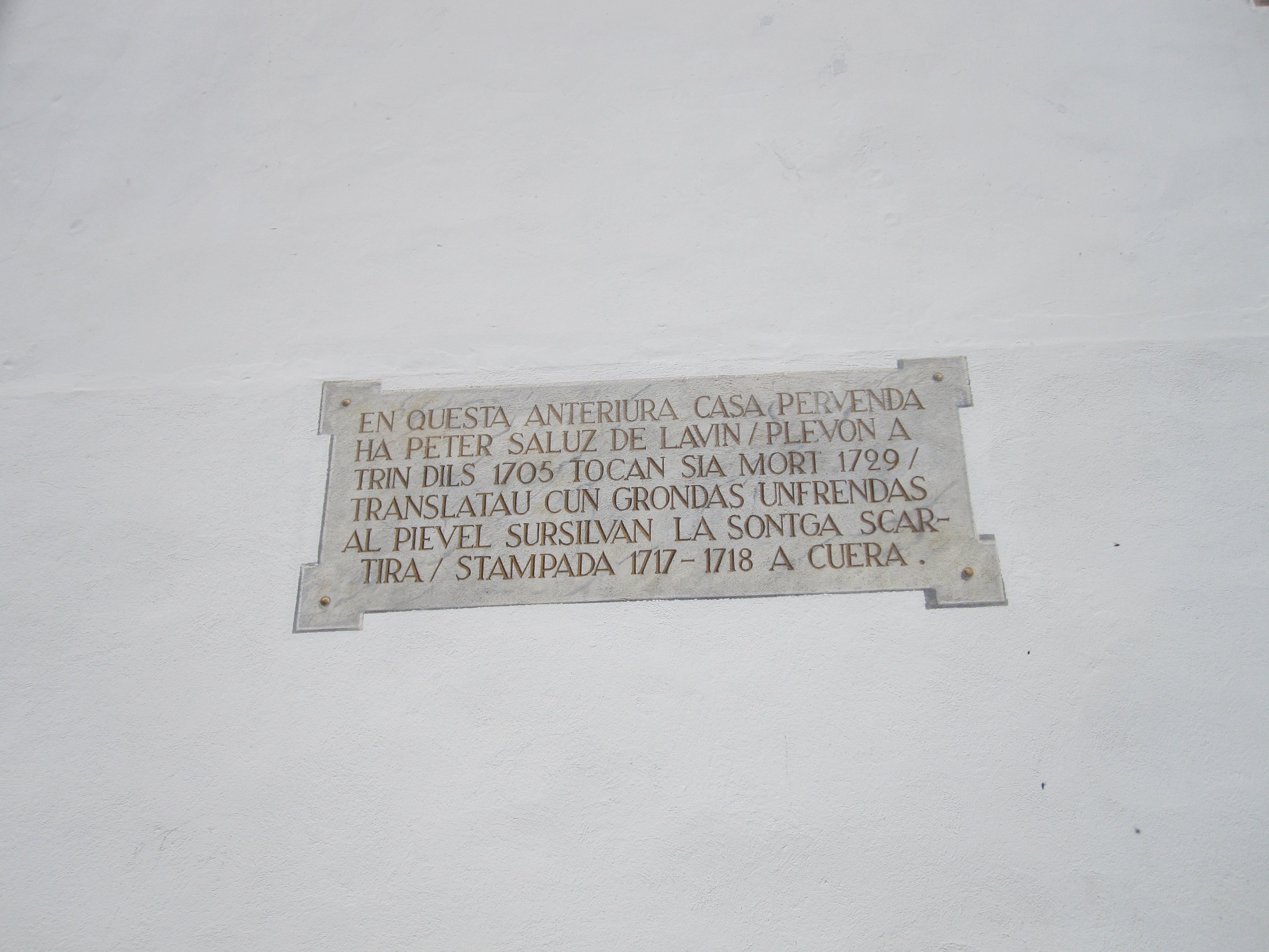 Hausinschrift auf Sursilvan in Trin (Kanton Graubünden): Erinnerung an Pfarrer Peter (Peider) Saluz